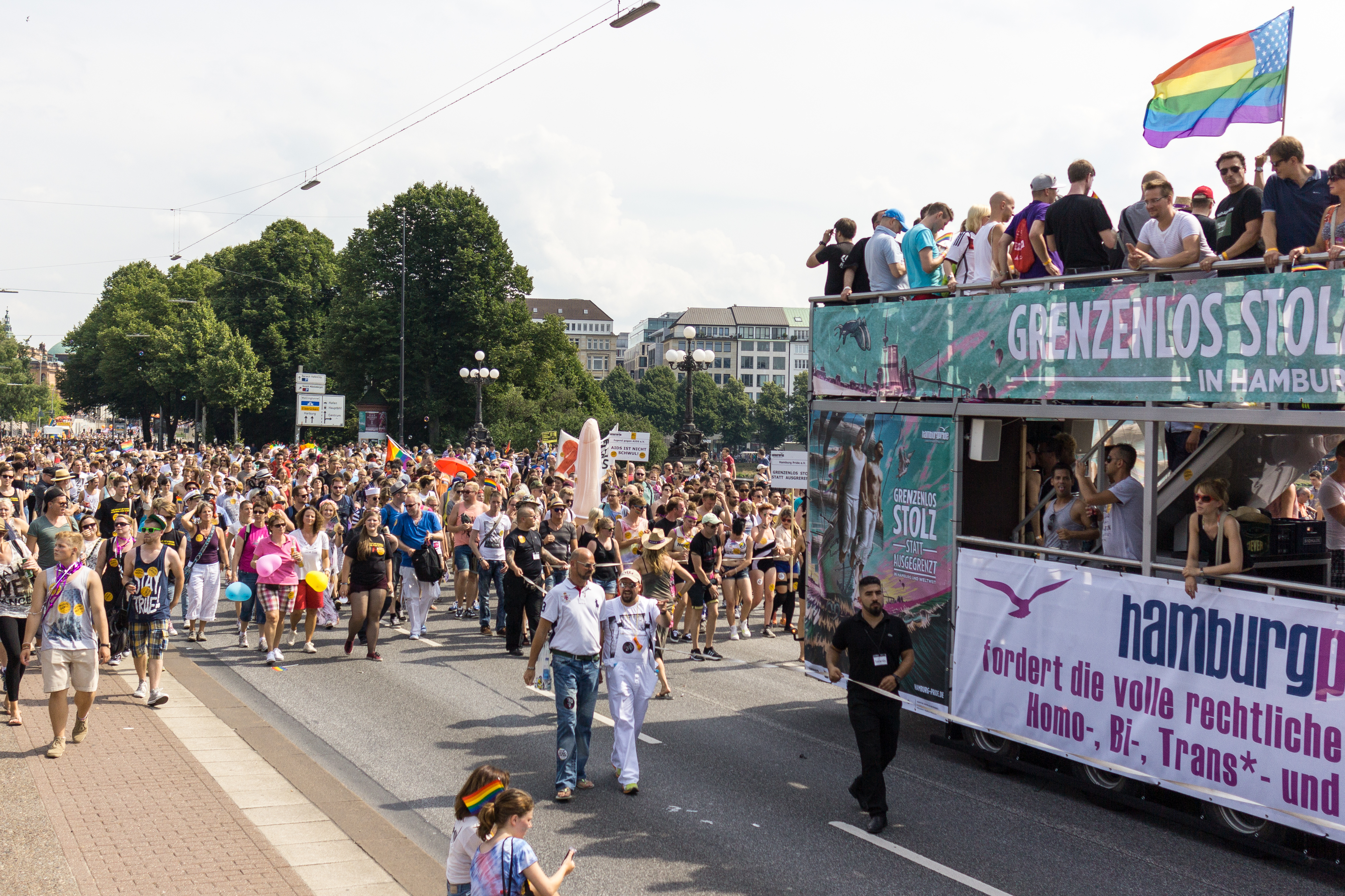 Die Front des CSD in Hamburg.